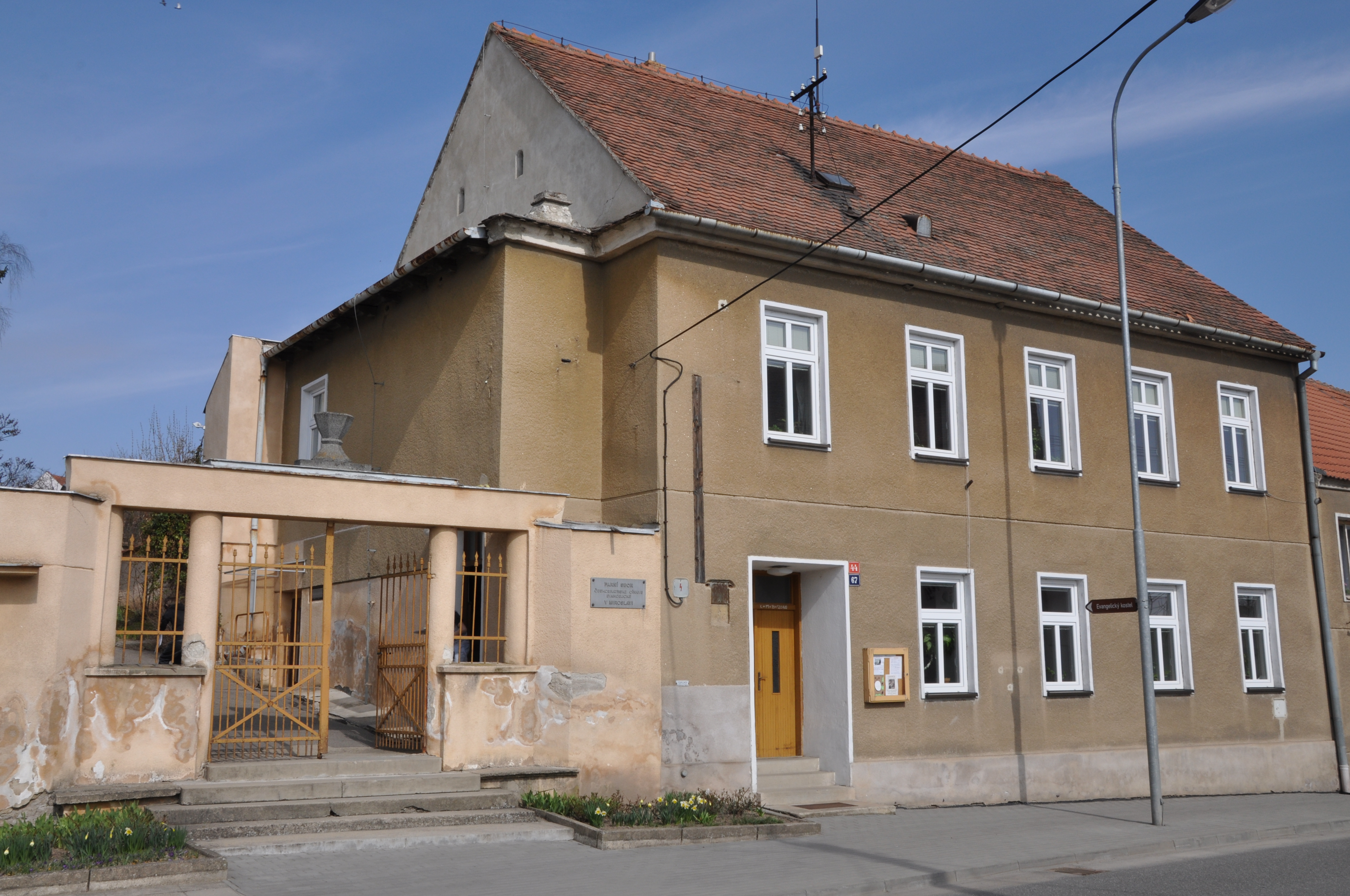 Evangelická fara v Miroslavi, okres Znojmo